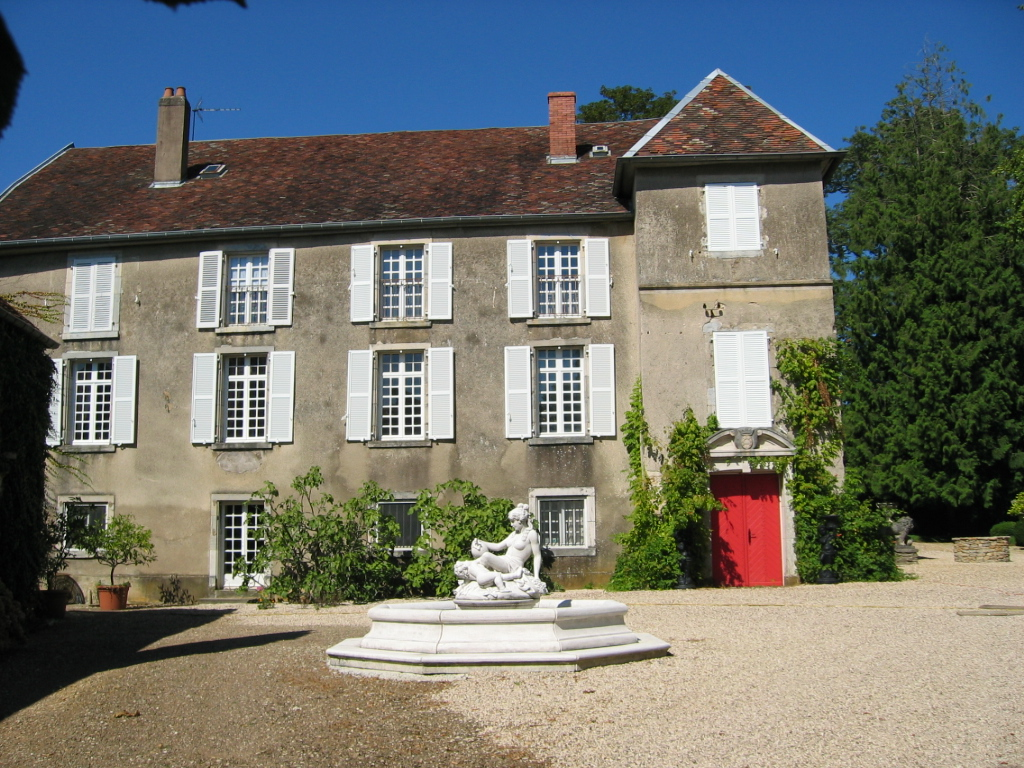 Château de Franois - en Franche-Comté - France